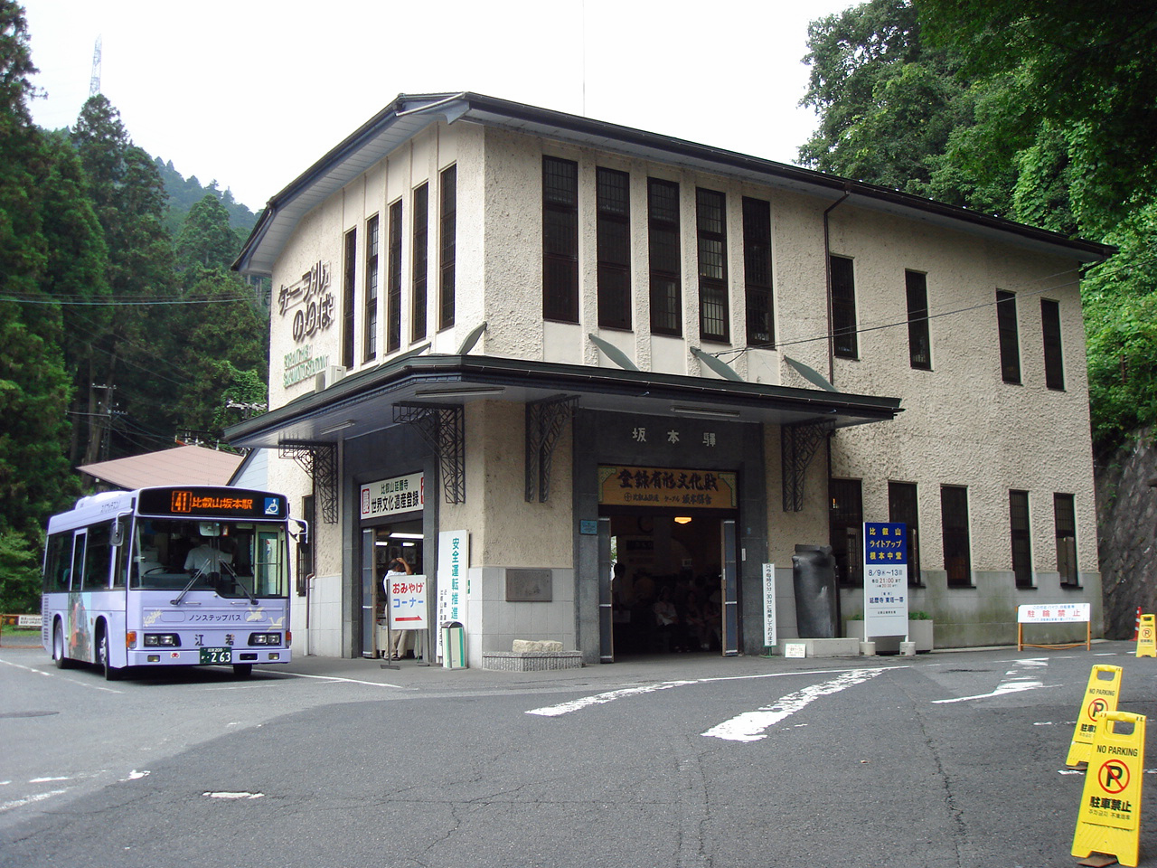 坂本ケーブルケーブル坂本駅駅舎